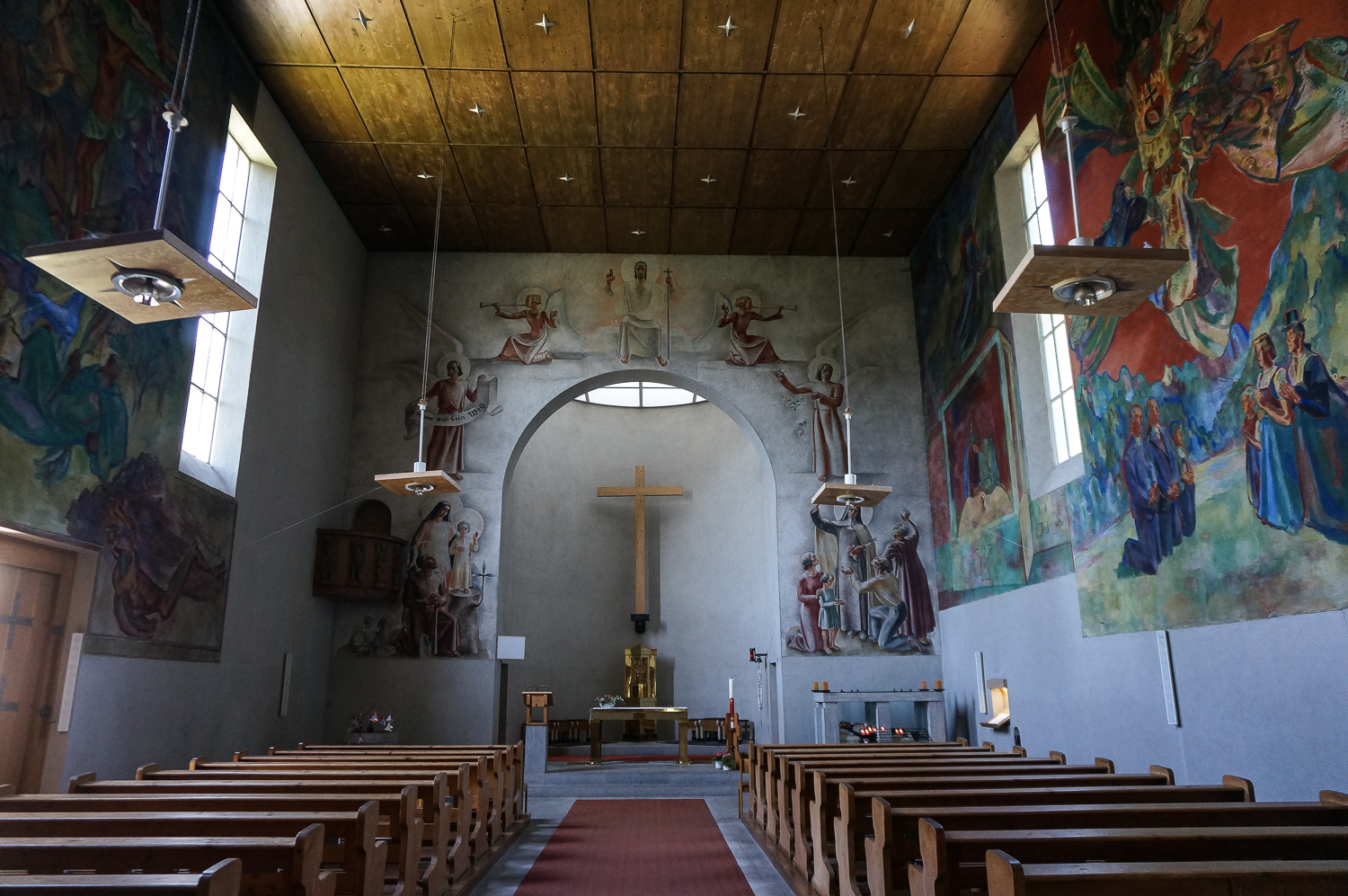 Innenansicht Freskenmalerei Max Weiler in der Theresienkirche in Innsbruck, Tirol, Österreich, EU